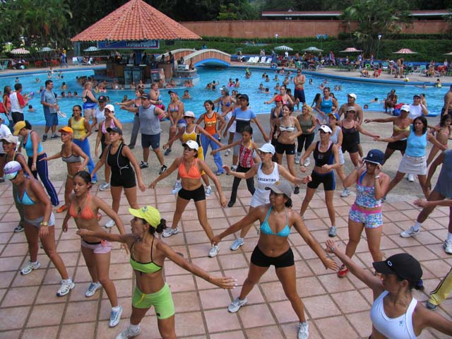 Figura 28: Actividades Recreativas en las instalaciones del Club Campestre Paracotos.